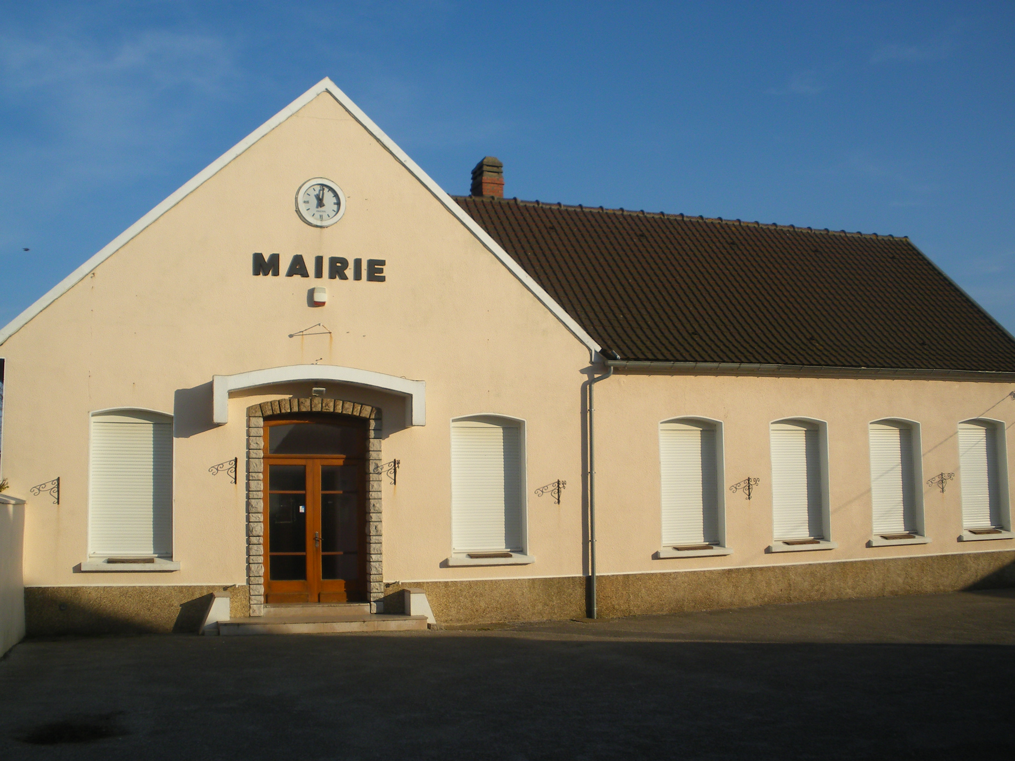 Vue de la mairie de Leulinghen-Bernes.